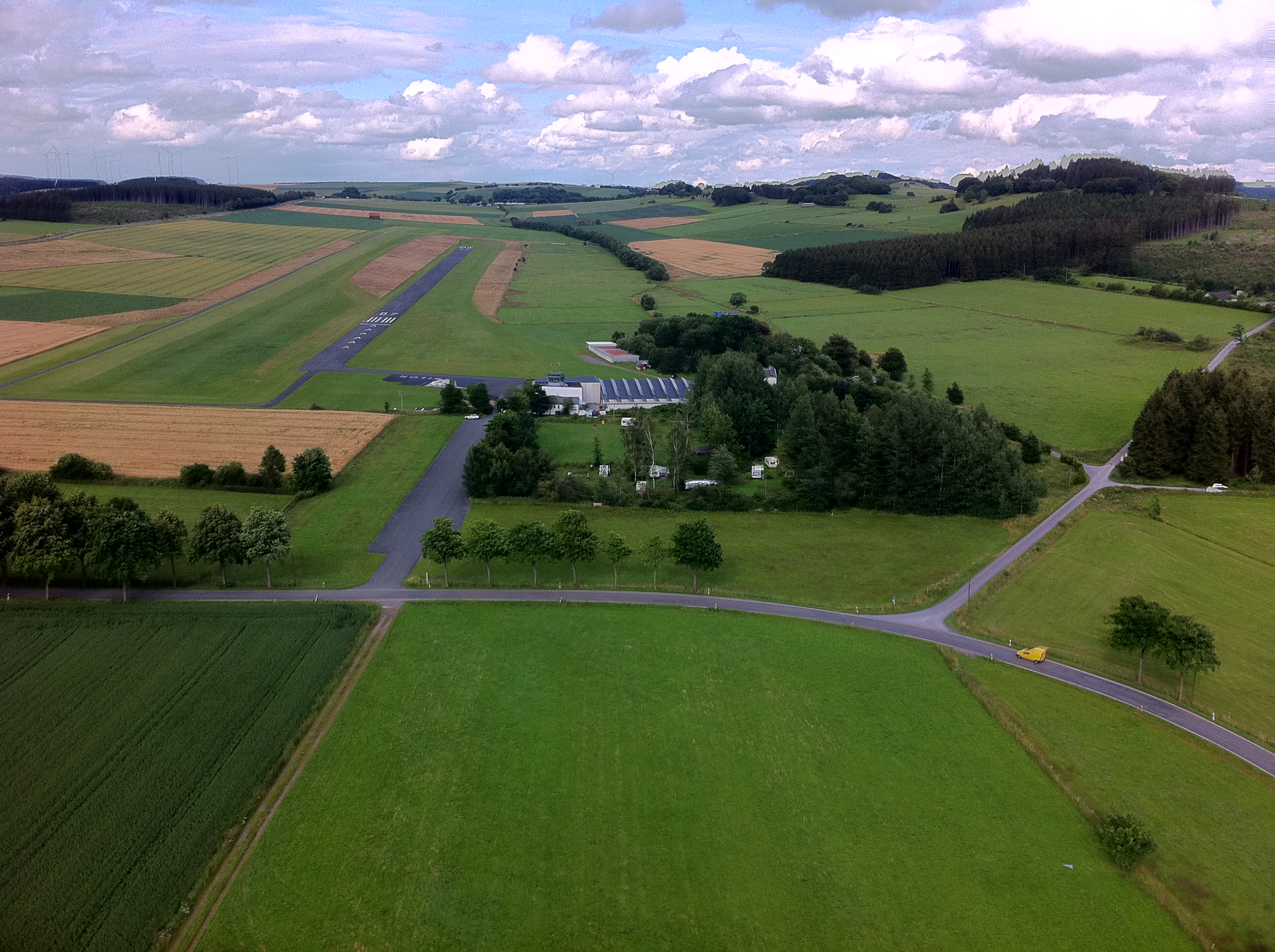 Blickrichtung Osten auf die Landebahn 07